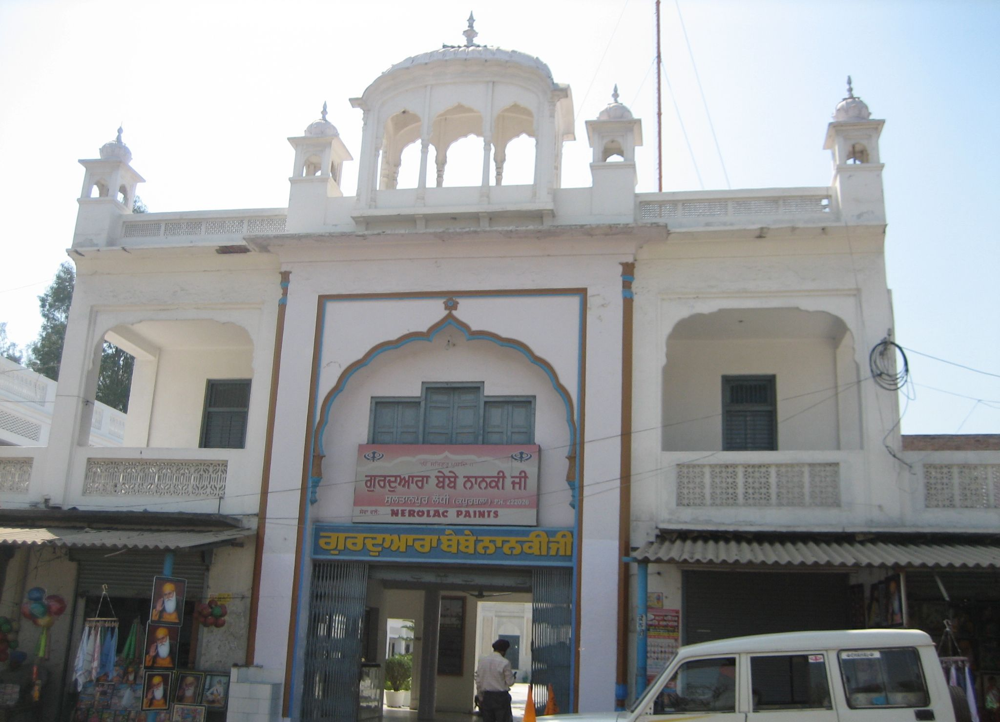 Gurudwara Bebe Nanaki Ji